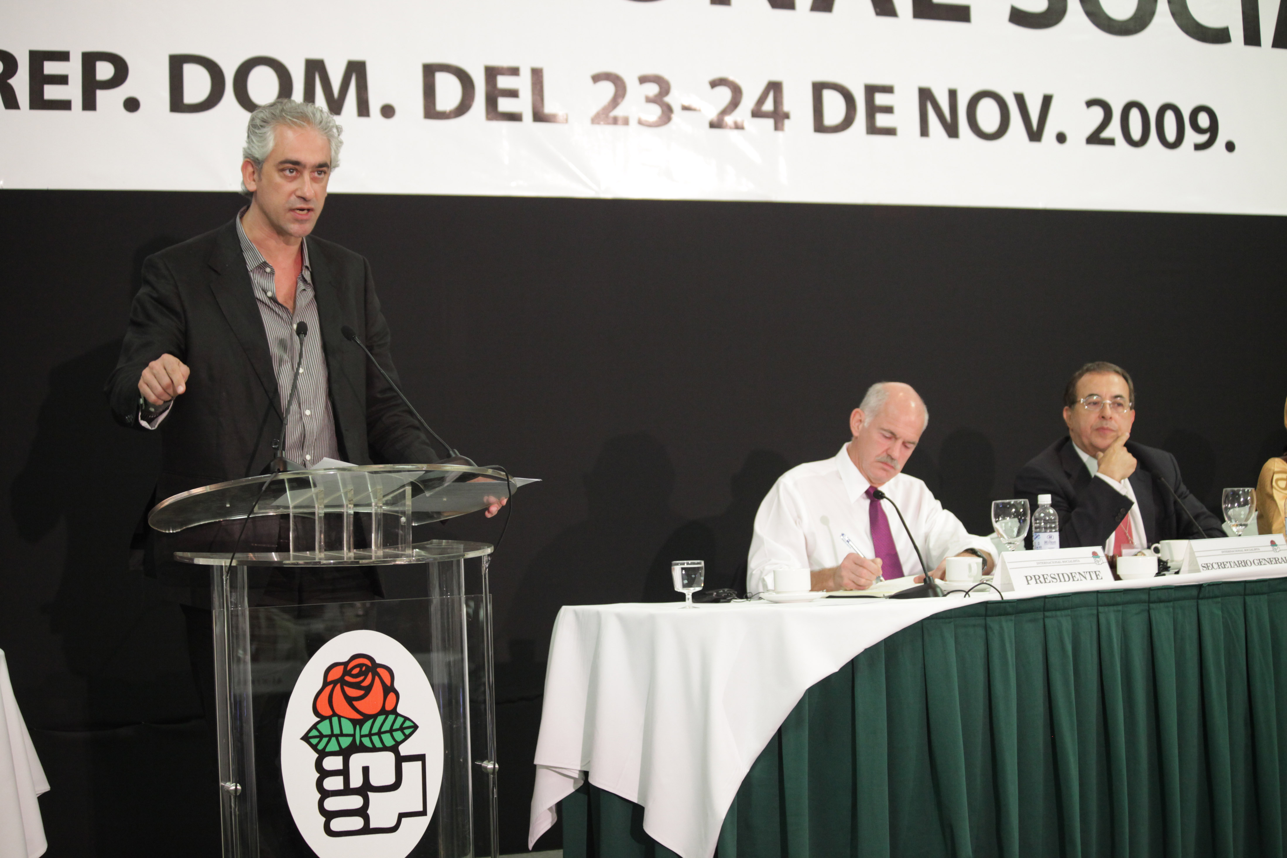 Ο Υφυπουργός Εξωτερικών Σπύρος Κουβέλης